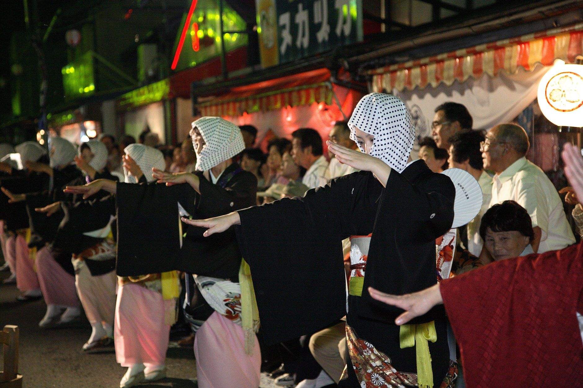 しとやかな手さばきで踊る踊り手たち